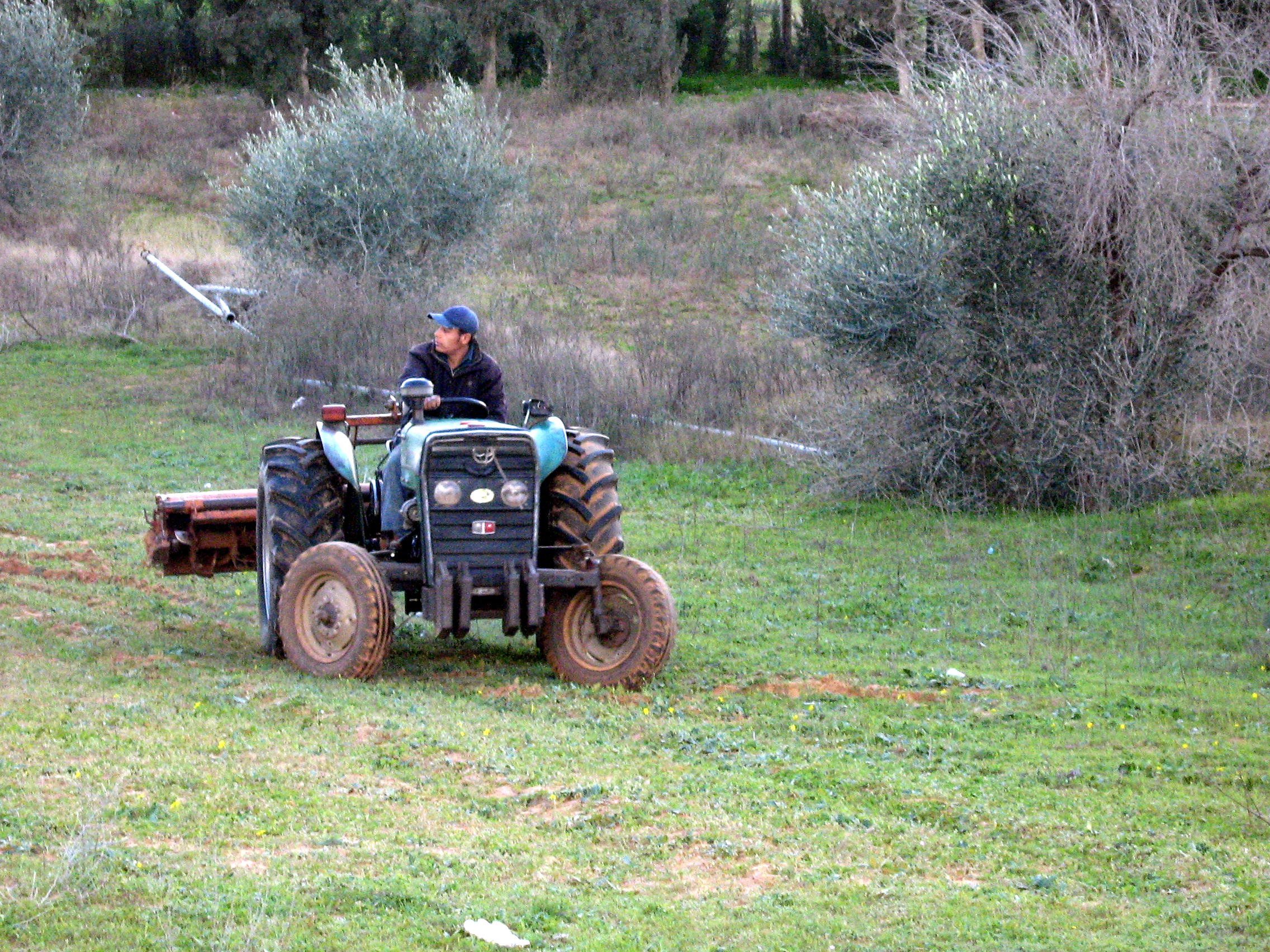 Обработка междурядий. Бенгашир. Ливия.